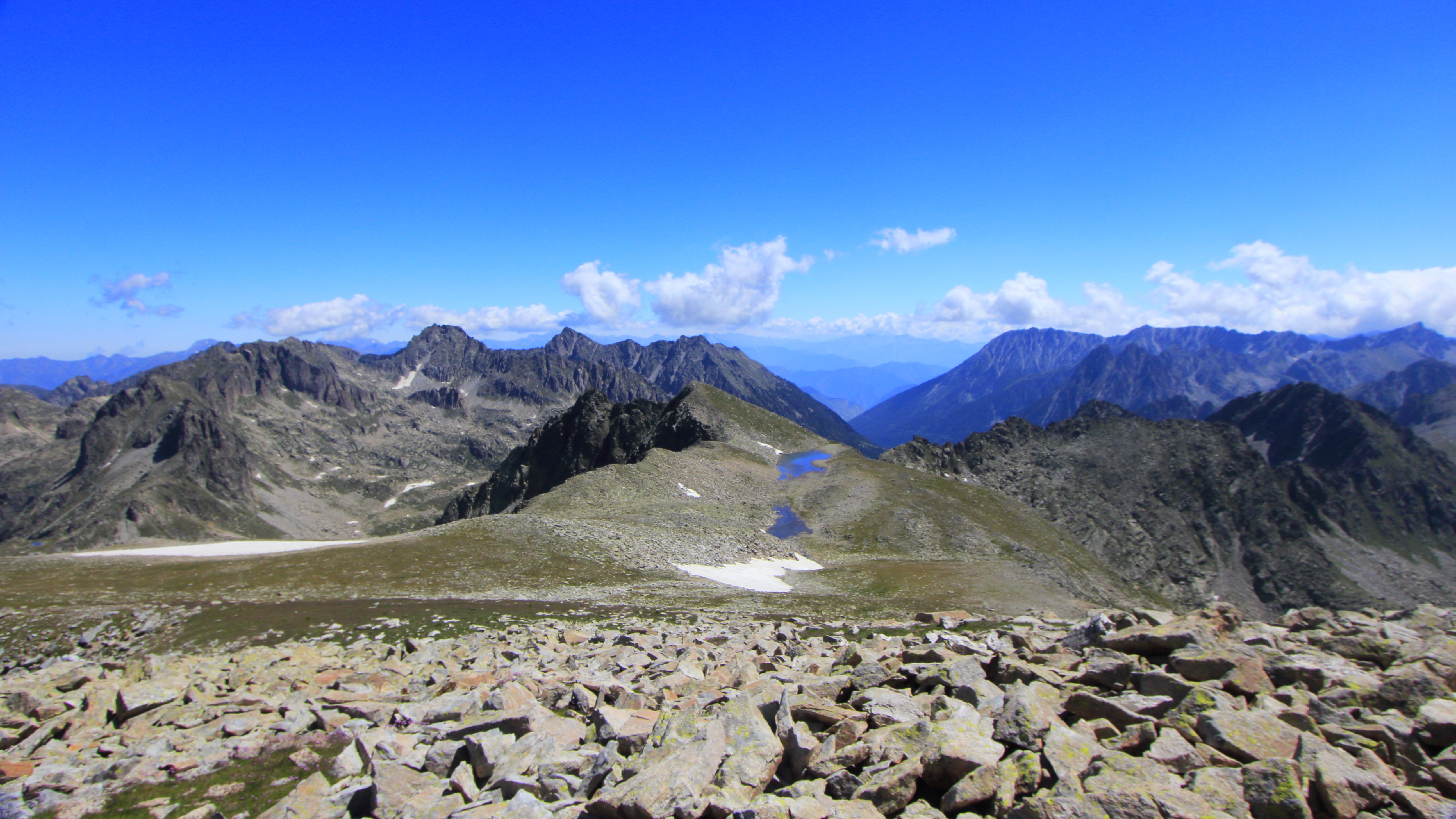 Pletiu entre el Pic de Bergús i el Gran Tuc de Crabes des de l'extrem occidental; Espot, Pallars Sobirà, Catalunya